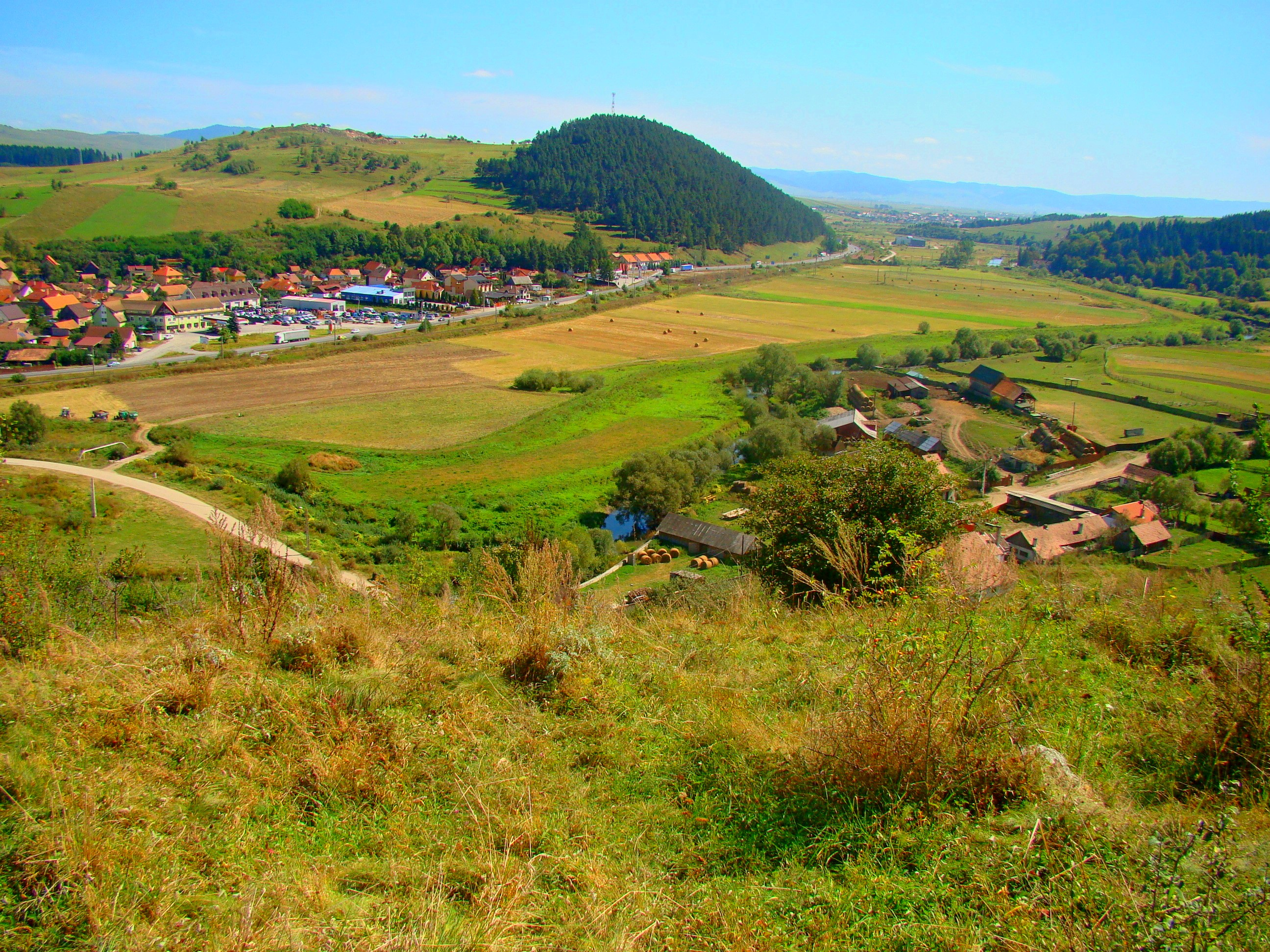 Cetatea Kisvár (Jigodin III)